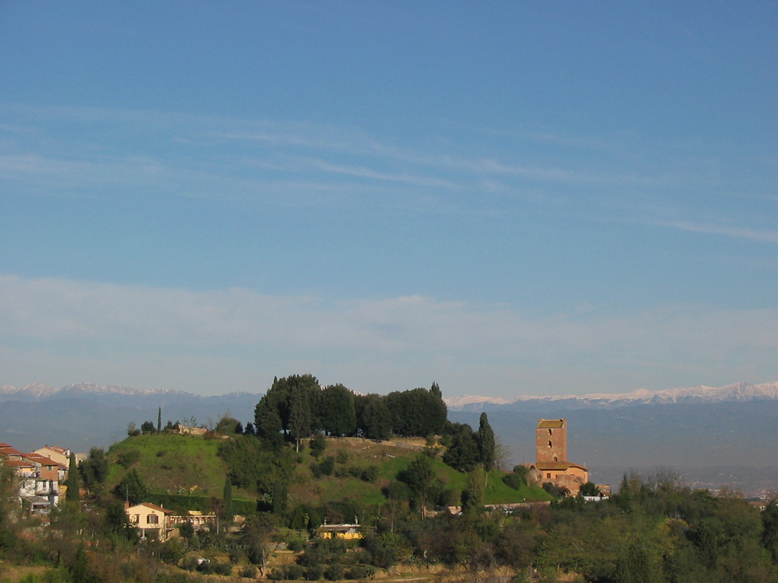 Veduta del poggio di Rocca con la torre di Castruccio Castracani